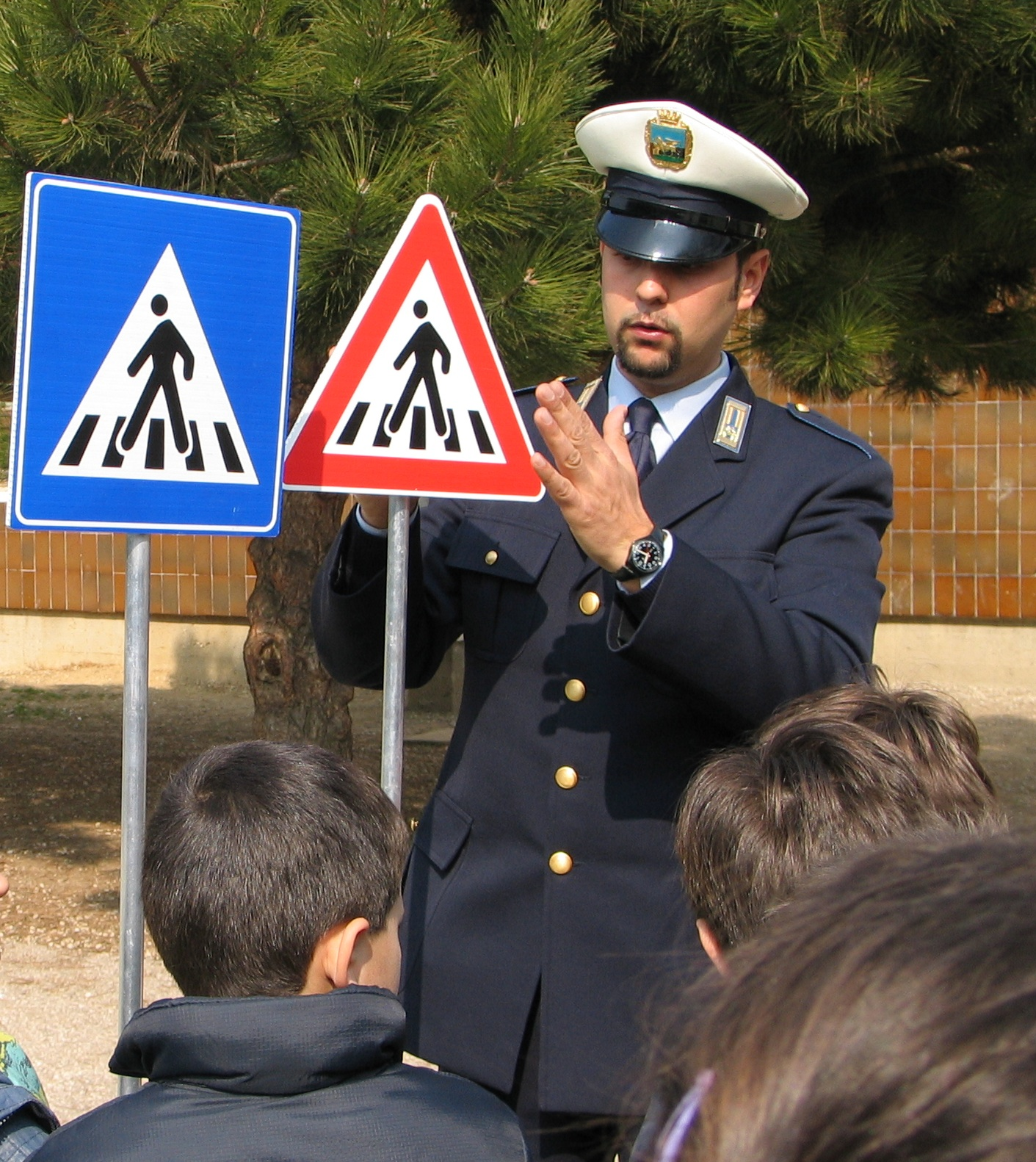 Agente di Polizia Municipale durante una lezione di educazione stradale.